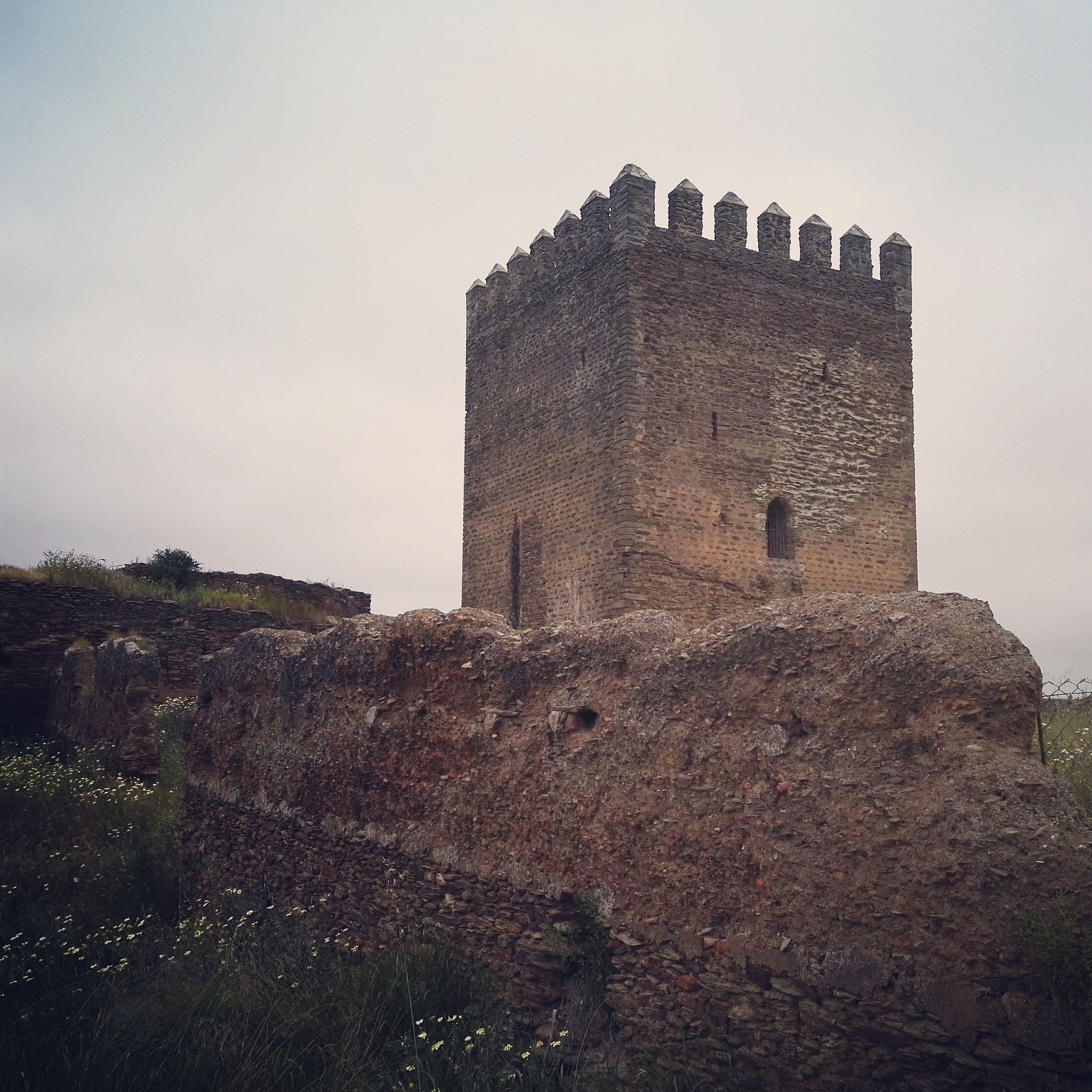 Castillo de Noudar, Barranco. Frontera con España